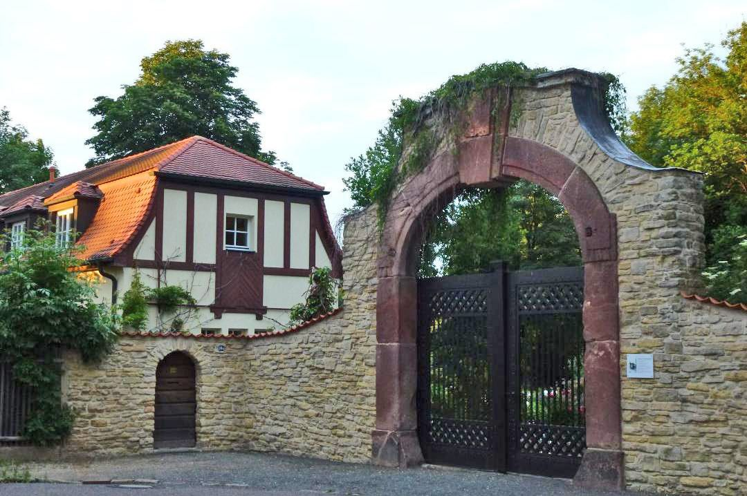 Torbogen des Johannishospitals, in das Schlobachsche Grundstück in Böhlitz-Ehrenberg eingebaut